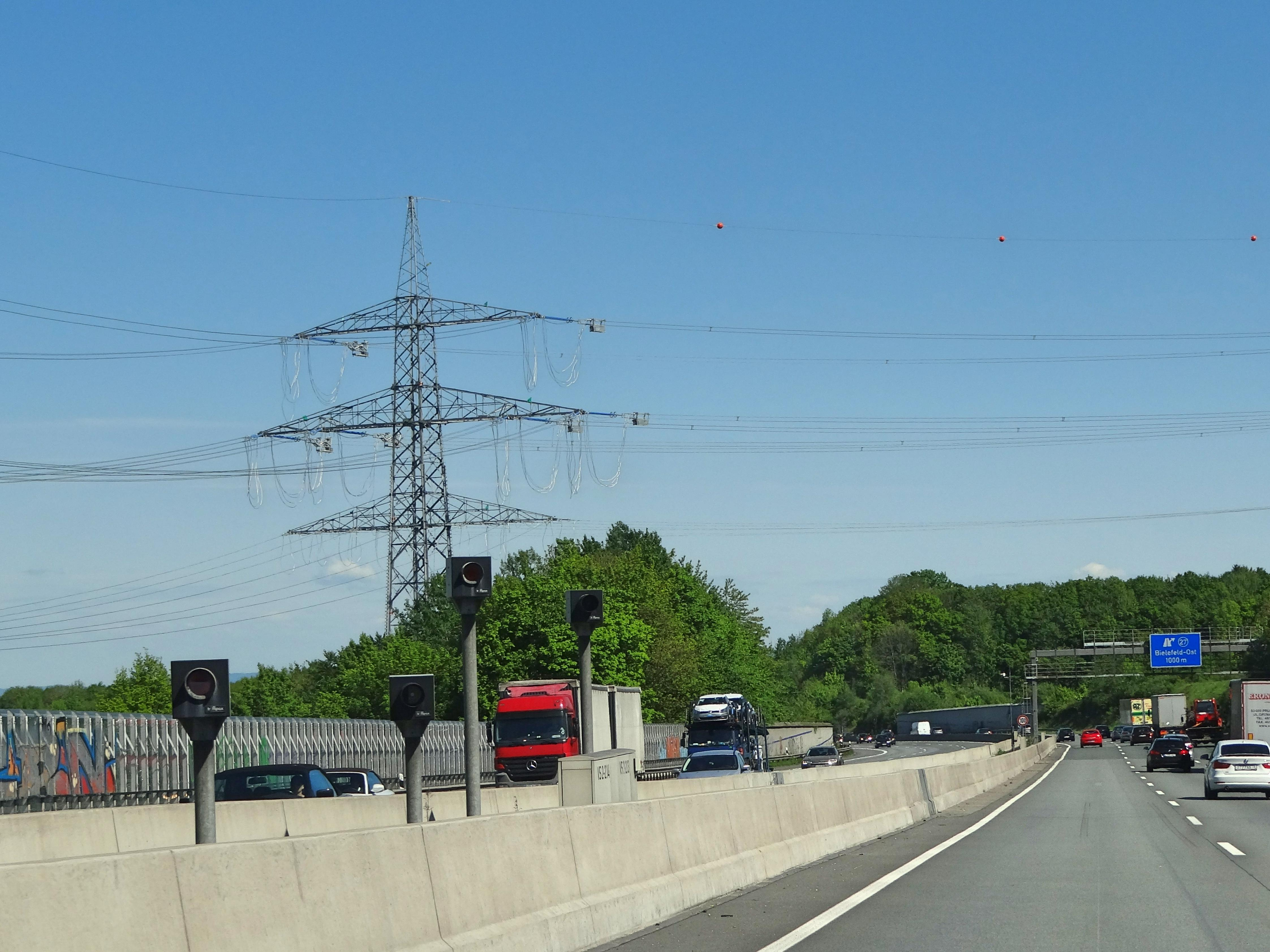 Blitzanlage auf der A2 südlich von der Abfahrt Bielefeld-Ost in Bielefeld; Autobahnkreuzung der Freileitung Gütersloh–Bechterdissen (Bl. 4375, im Bau)